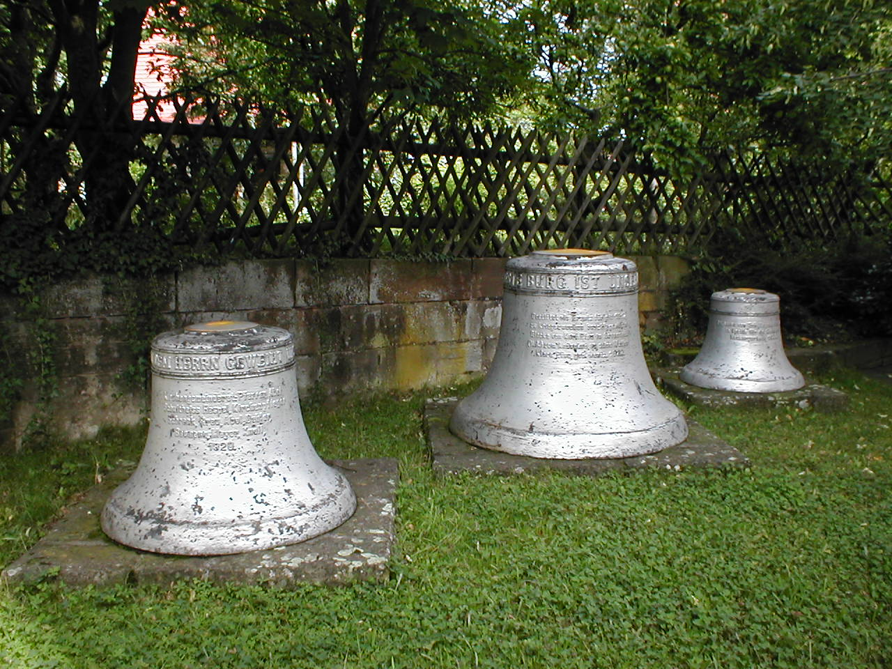 Gespendete Glocken vor der Peterskirche in Neckargartach. Die ursprünglichen Glocken waren im Ersten Weltkrieg eingeschmolzen worden, als Ersatz wurden diese Glocken gespendet.